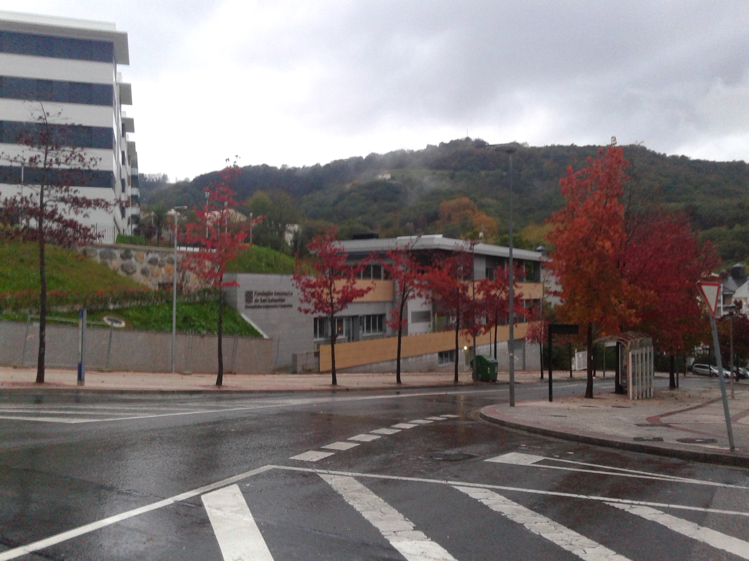 Goienetxe Fundazioaren Garagunea.